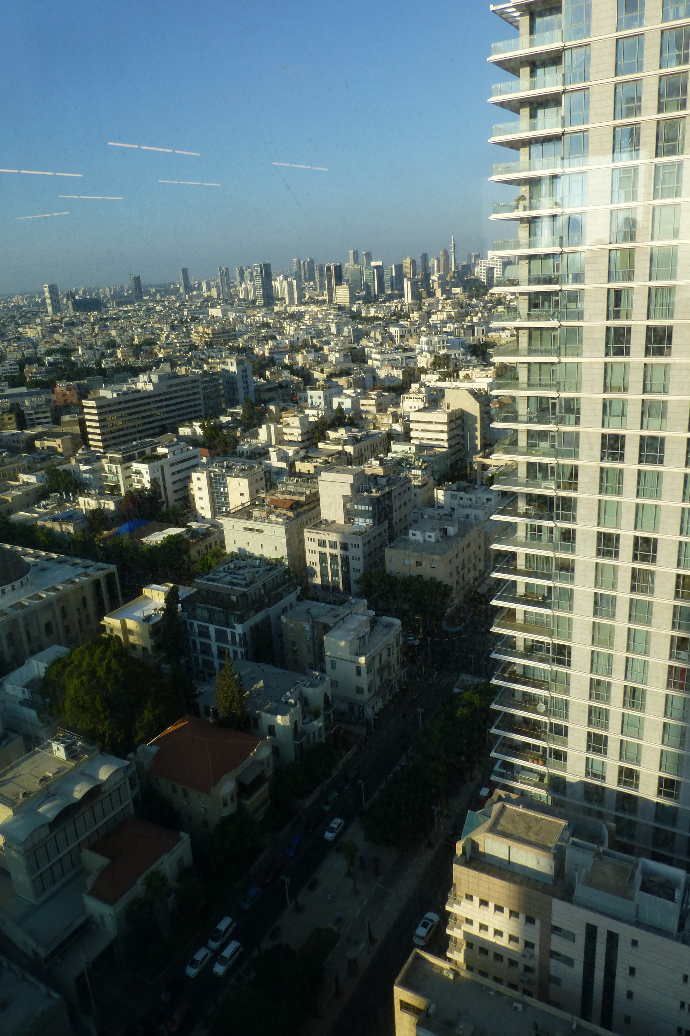 שדרות רוטשילד היו בין ארבעת הרחובות הראשונים של תל אביב (שנקראה אז "אחוזת בית"), שנחנכו לאחר רחוב הרצל (הרחוב הראשון בעיר), ובניצב אליו. הרחובות נסללו על גבי דיונות חול אשר יושרו ושוטחו, ולאורכם נבנו בתיה הראשונים של העיר. התוואי שהפך להיות השדרה היה ואדי קטן שאותו קשה היה ליישר באמצעים של אז, ואליו גם התנקזו מים רבים בחורף. בשל כך הוחלט למלאו בחול להשאירו כשטח פתוח שעליו לא ייבנו בתים אלא בצדיו, כרחוב עירוני רחב יותר. בט"ו בשבט ה'תר"ע (1910) החלו נטיעות בשטח פתוח זה, במטרה להפוך את הרחוב לשדרה הראשונה של העיר. חודשים אחדים לאחר מכן, בדצמבר 1910, החליט ועד אחוזת בית לקרוא לשדרה על שם הברון רוטשילד, ולמנות את מרדכי בן הלל הכהן ואת מאיר דיזנגוף להודיע על כך באופן רשמי לברון. אנשי אחוזת בית ראו בשדרה את תחילתה של שדרה מפוארת כדוגמת הבולווארים המפוארים של פריז.